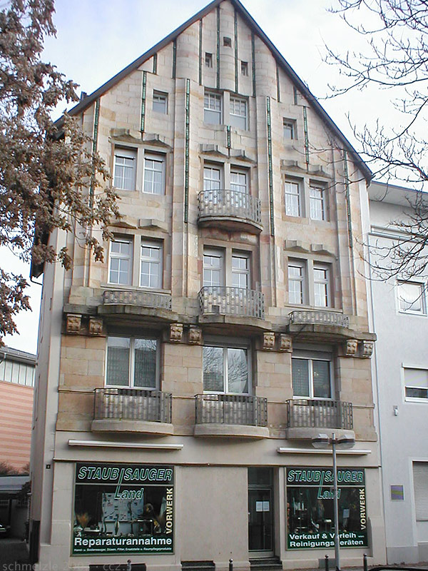 Haus Kunz in der Roßkampffstr. 4 in Heilbronn